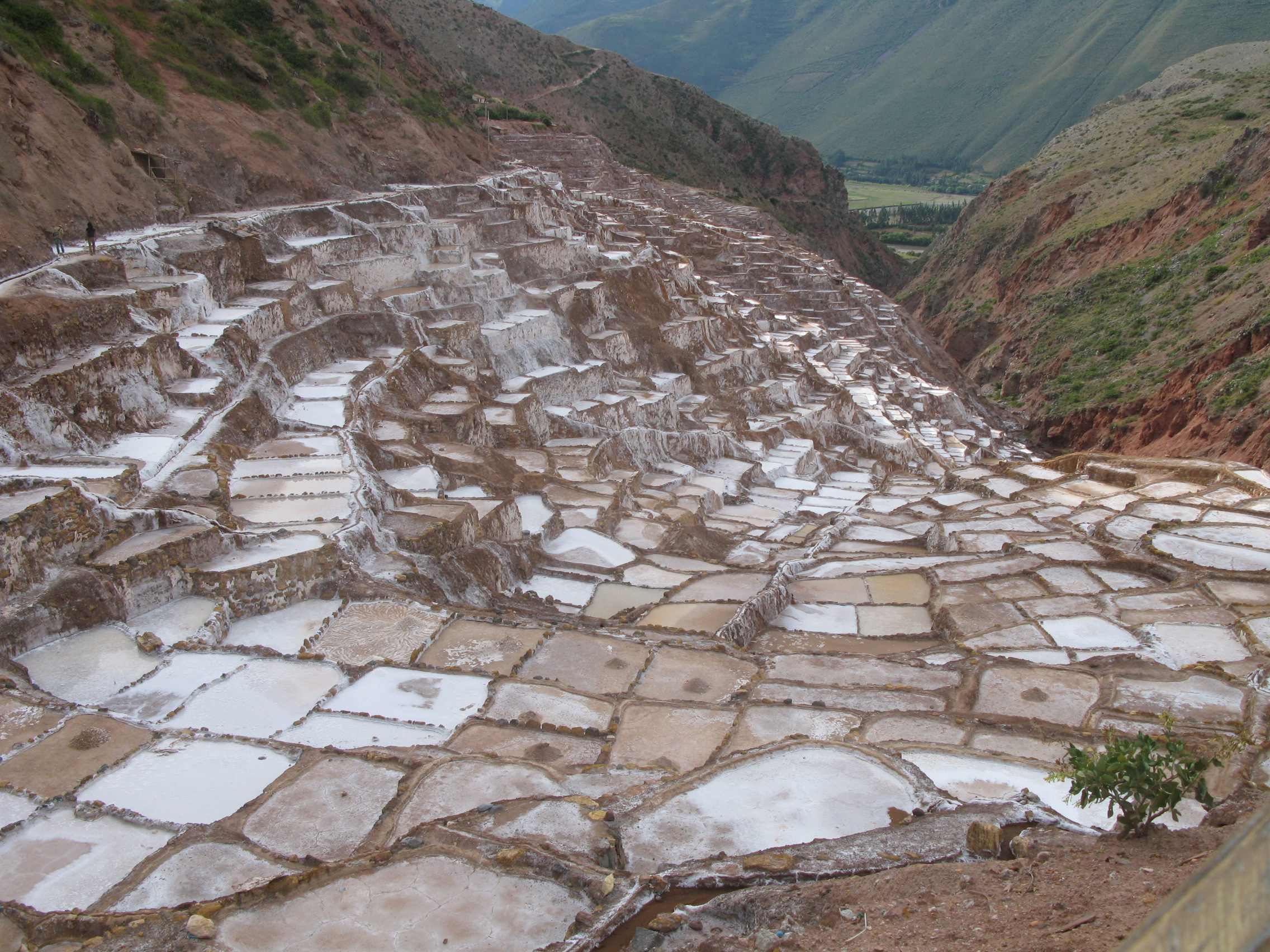 Pridobivanje soli v kraju Saline de Maras: slanica nastane pri izpiranju zemljine, ki vsebuje sol